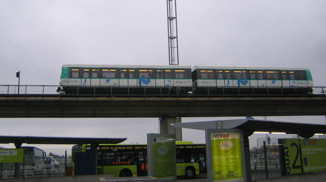 Orlyvyl